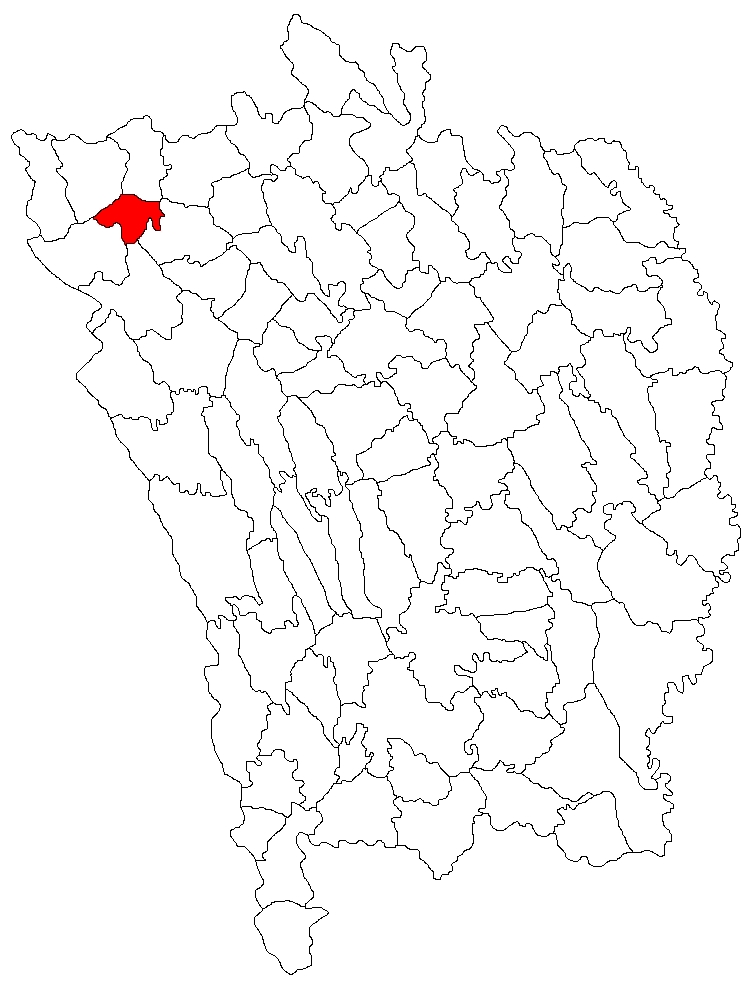 Categorie:Hărţi ale judeţului Vaslui